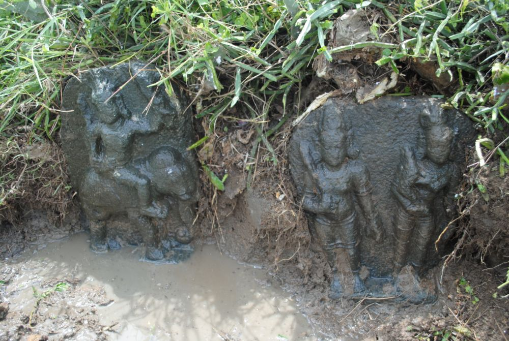 தேவிகாபுரம் அய்யனார் நடுகல்- அரியவகை நடுகல் 12 ஆம் நூற்றாண்டு.